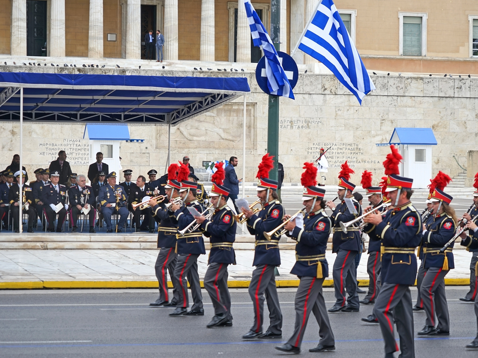 Devant le Parlement et le monument aux Morts, défilé devant les autorités civiles et militaires à l'occasion de la fête nationale grecque (le jour du Ochi) en commémoration du 28 octobre 1940. Ce jour là, le général grec Ioannis Metaxas a répondu Ochi (non) à Mussolini qui avait lancé un ultimatum à la Grèce. La journée symbolise l'esprit patriotique grec. De nombreux enfants et adolescents participent au défilé aux cotés de l'armée et de la police.